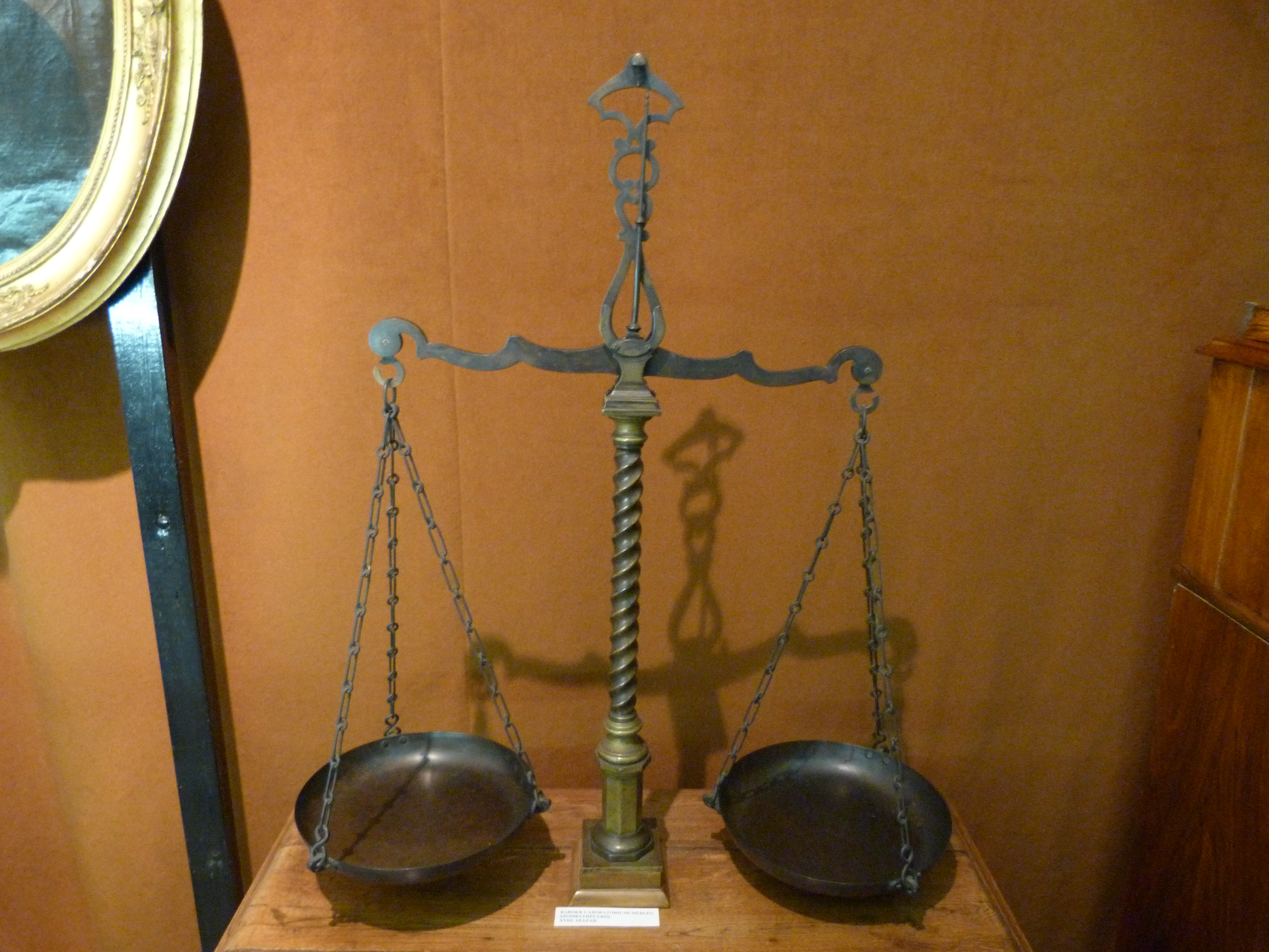 A felvétel 2015. február 21-én készült Budapesten. Orvostörténeti Múzeum, barokk laboratóriumi mérleg. Szombathely, 18. század. ©© Derzsi Elekes Andor, Budapest, 2015, A fénykép másolását és felhasználását a szerző ellenérték nélkül, jogutódjaira is kihatóan megengedi. Az engedély kiterjed a kereskedelmi célú hasznosításra is. Kéri azonban nevének feltüntetését a felhasználás során. A Metapolisz sorozat valamennyi képe és filmje Creative Commons alatti. kereskedelmi - for profit - célra is felhasználható. Ajánlott hivatkozás: Derzsi Elekes Andor: Metapolisz DVD line